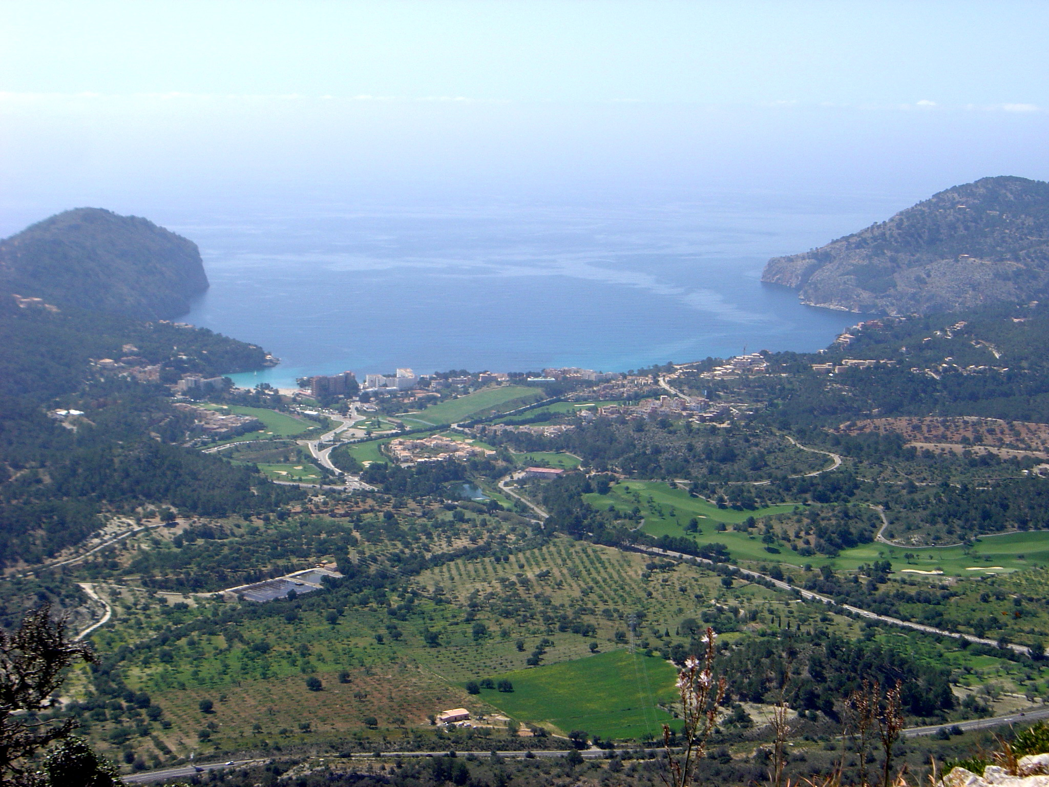 Camp de Mar, vist des de Garrafa. Mallorca.